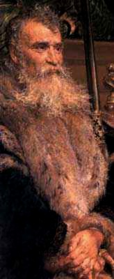 Jan Firlej, fragment of Unia Lubelska